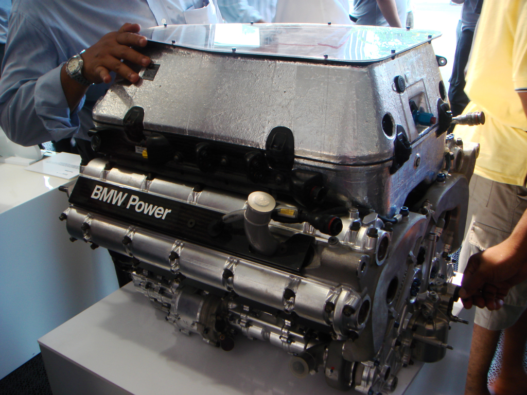 BMW Sauber F1 Engine